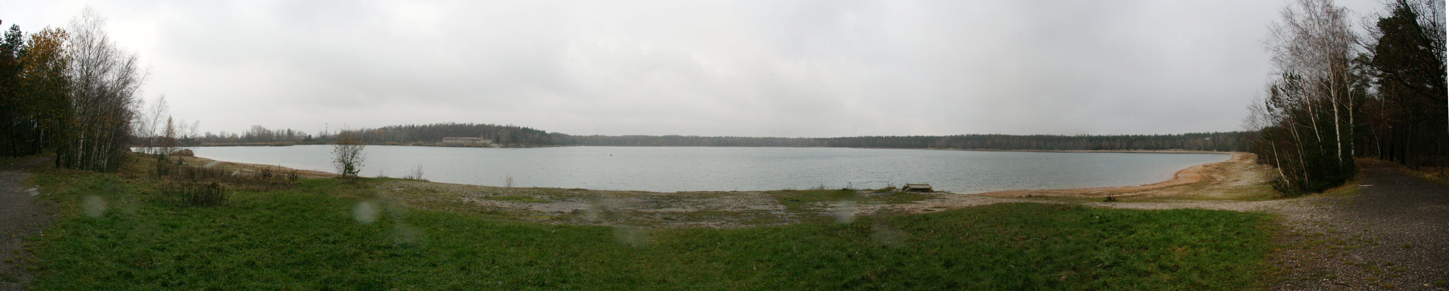 Panorama des Grillensee bei Naunhof, von der Südseite aus gesehen